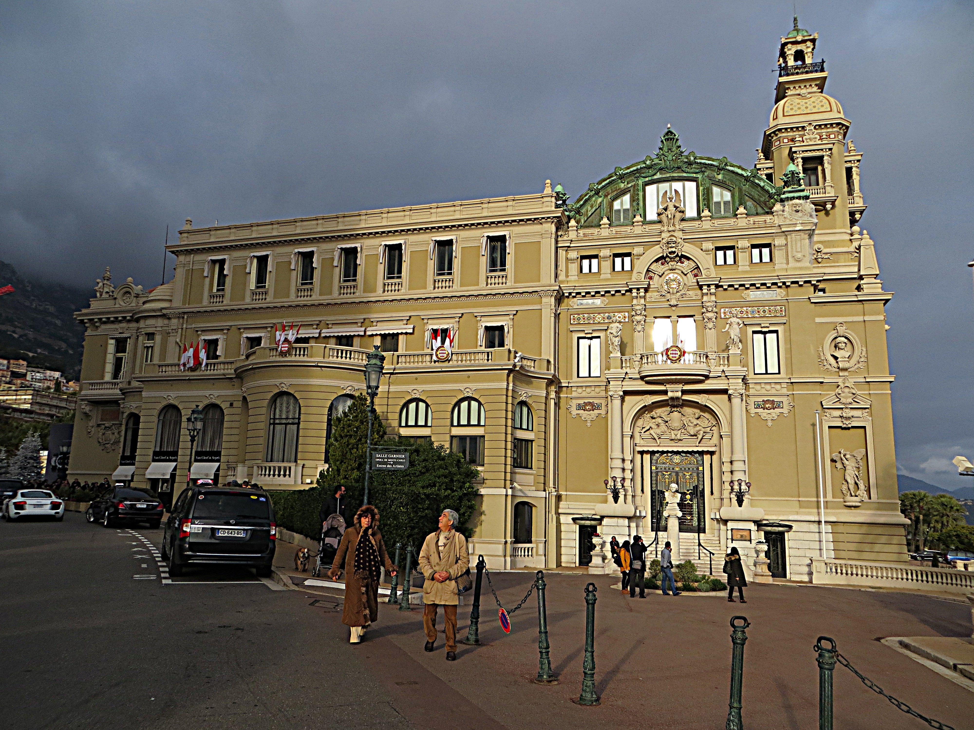 Casino Monte - Carlo